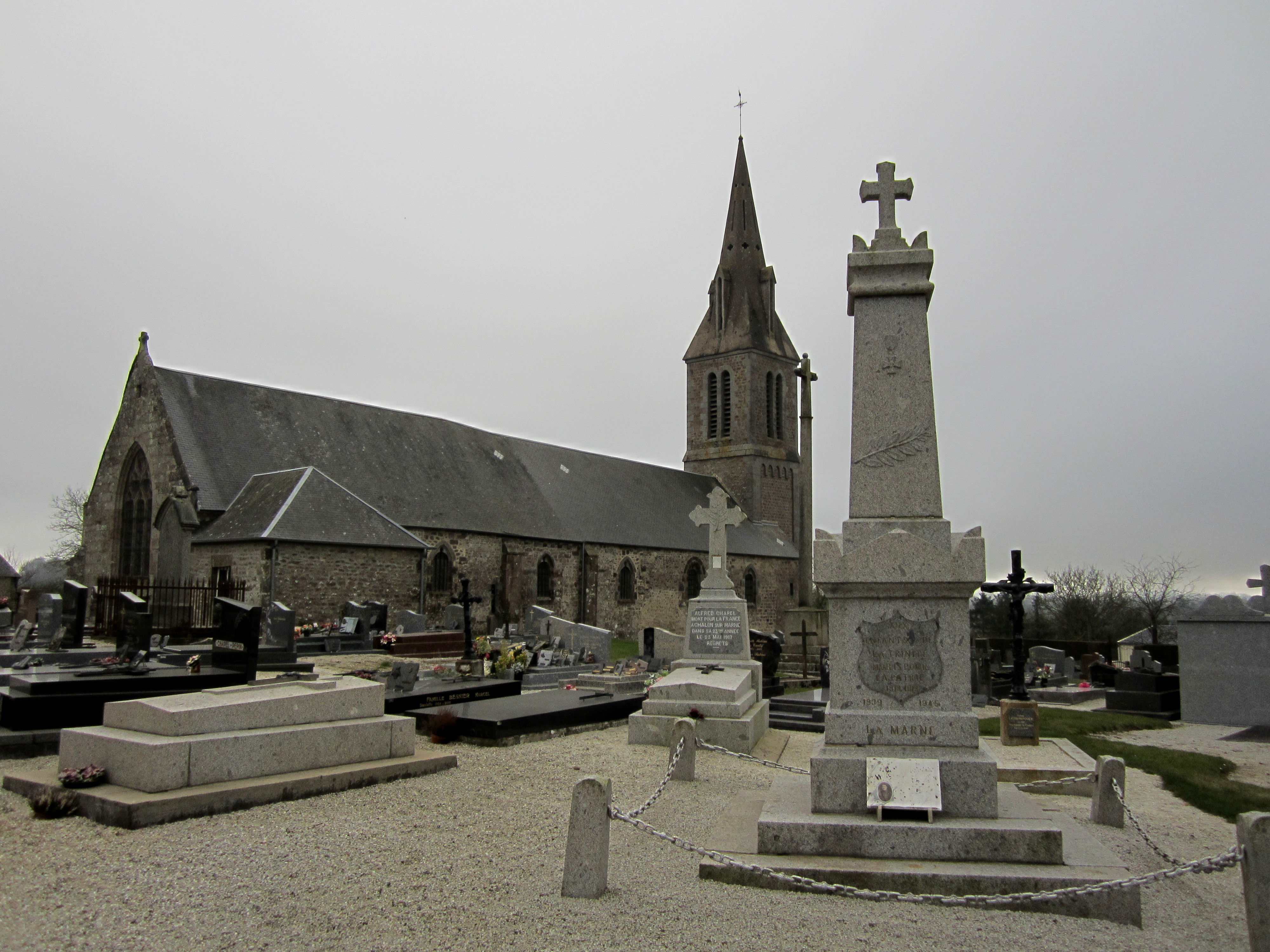 La Trinité, Manche